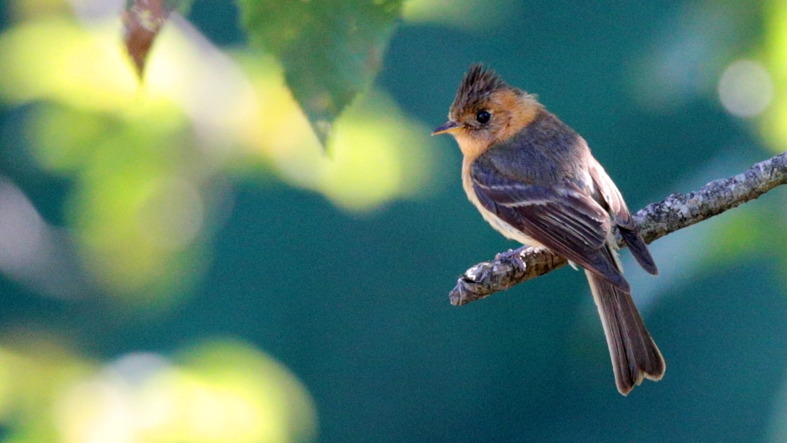 Mosquero Copetón